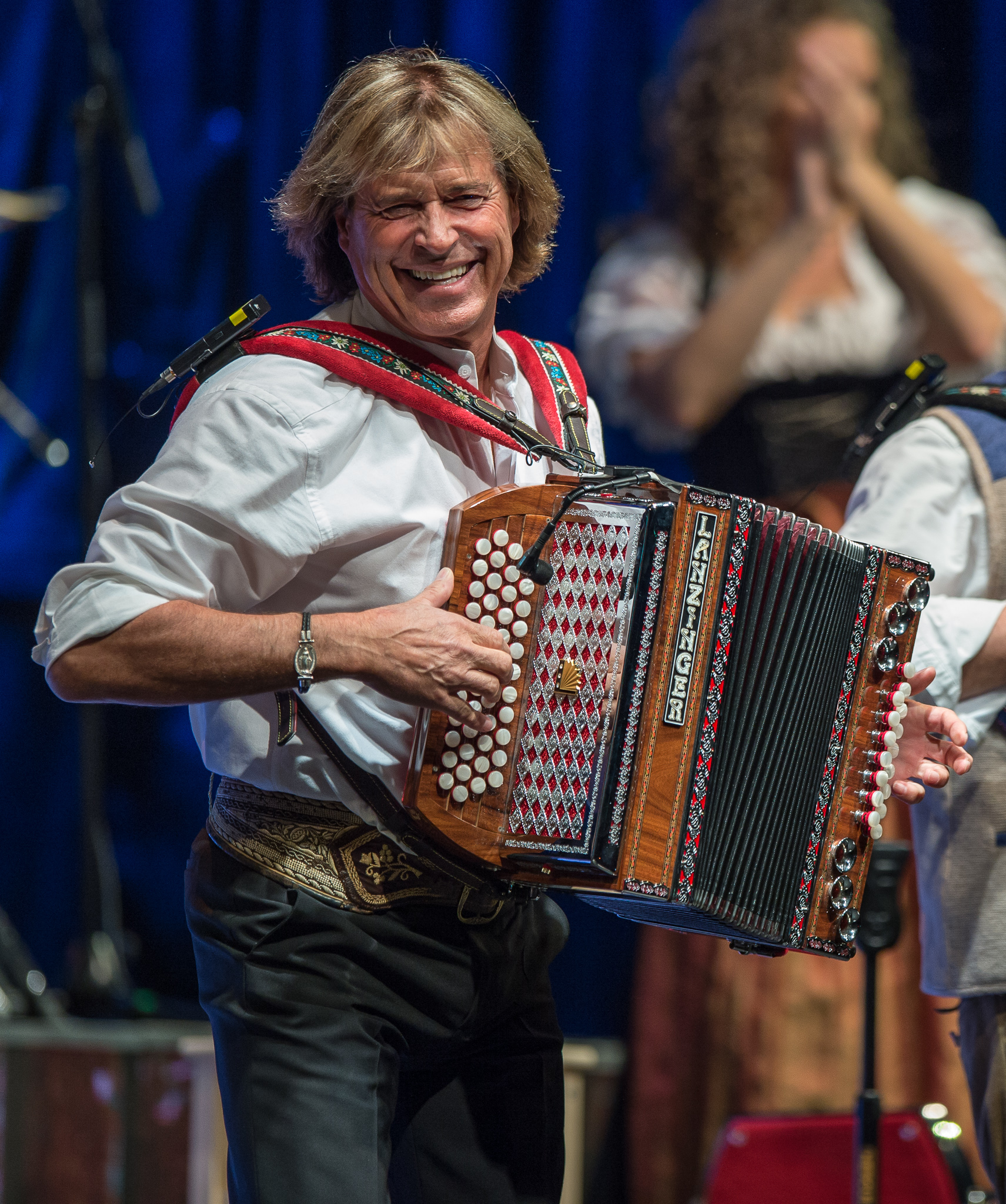 ARGO-Konzerte,Frankenhalle,Hansi Hinterseer,Konzert,Livekonzert,Livemusik,Musik,Tournee 2016